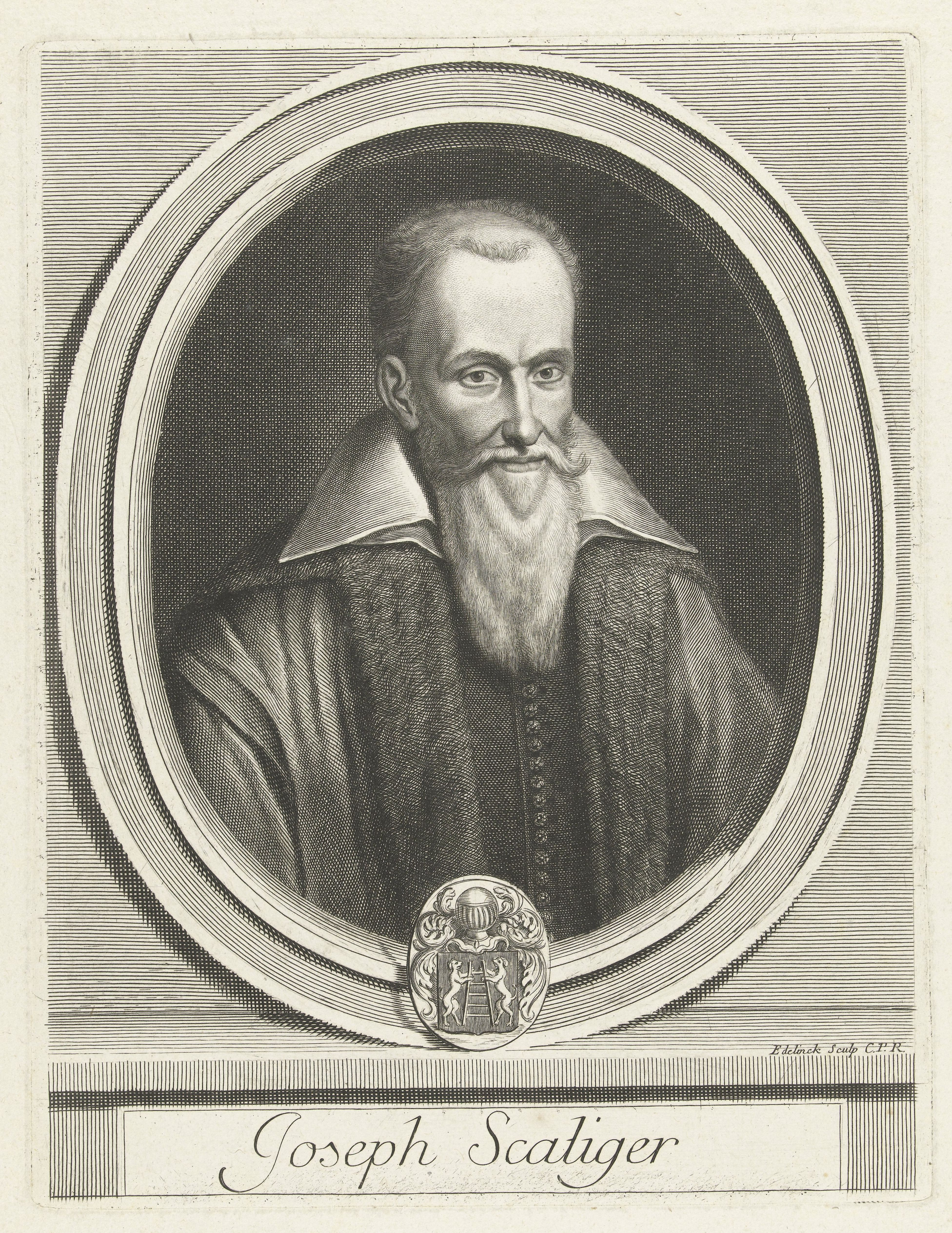 IdentificatieTitel(s): Portret van Josephus Justus ScaligerJoseph Scaliger (titel op object)Objecttype: prent Objectnummer: RP-P-BI-7398XCatalogusreferentie: Robert-Dumesnil 316Opschriften / Merken: verzamelaarsmerk, verso, gestempeld: Lugt 2228Omschrijving: Portret van Josephus Justus Scaliger (1540-1609) een Franse protestantse humanist, dichter, polemist en hoogleraar aan de Universiteit Leiden. Afgebeeld in ovale omlijsting met wapen.VervaardigingVervaardiger: prentmaker: Gerard Edelinck (vermeld op object)verlener van privilege: Lodewijk XIV (koning van Frankrijk) (vermeld op object)Plaats vervaardiging: prentmaker: Parijsverlener van privilege: FrankrijkDatering: 1666 - 1707Fysieke kenmerken: gravureMateriaal: papier Techniek: graveren (drukprocedé)Afmetingen: plaatrand: h 251 mm × b 193 mmOnderwerpWie: Josephus ScaligerVerwerving en rechtenVerwerving: onbekendCopyright: Publiek domein